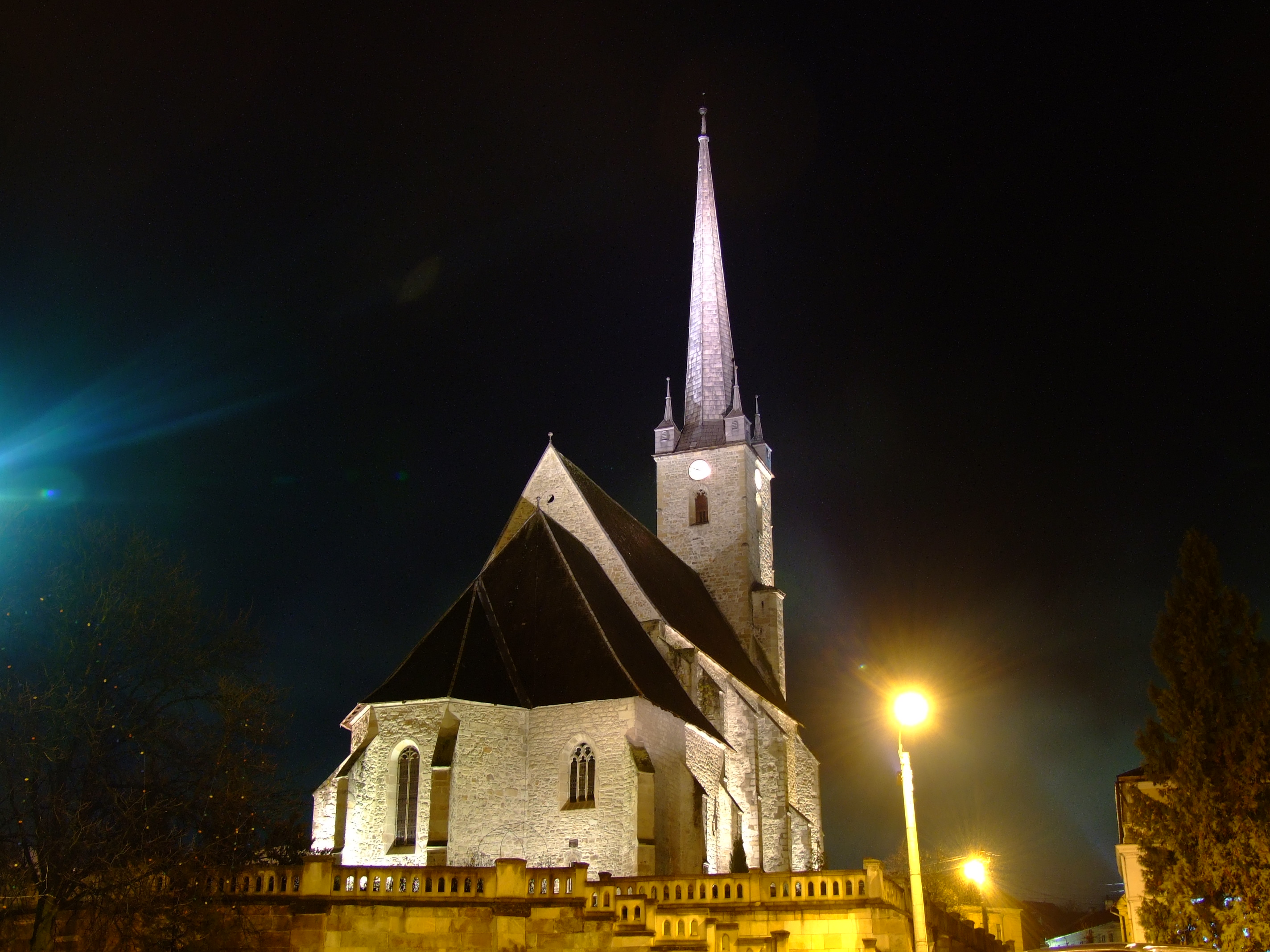 Biserica Reformata, Dej